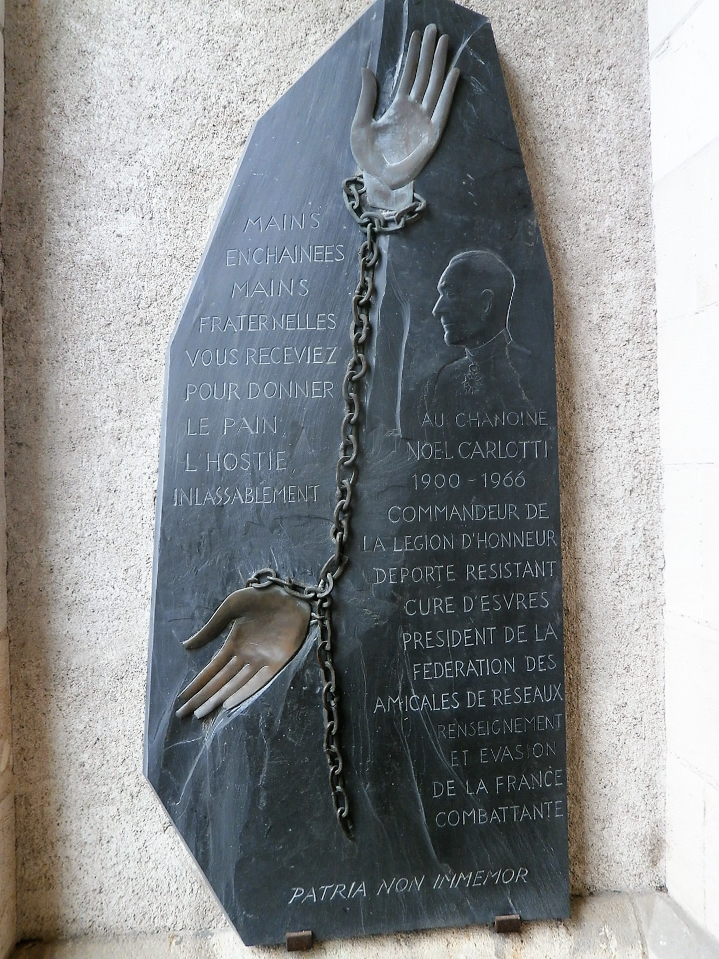 Plaque à la mémoire du chanoine Noël Carlotti (église d'Esvres)